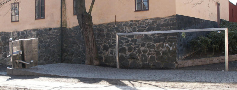 Nacka Skoglund memorial by Olle Adrian at Nackas Hörna, Stockholm, Sweden.